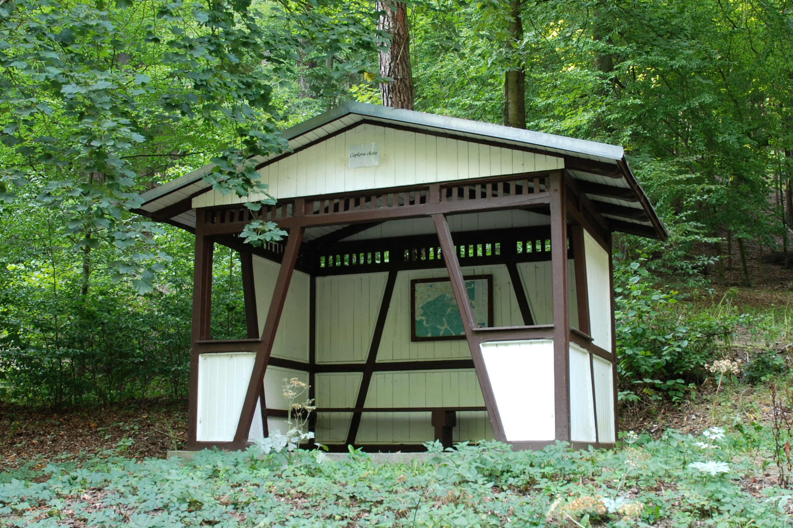 Čapkova chata v karlovarských lázeňských lesích u Slovenské ulice